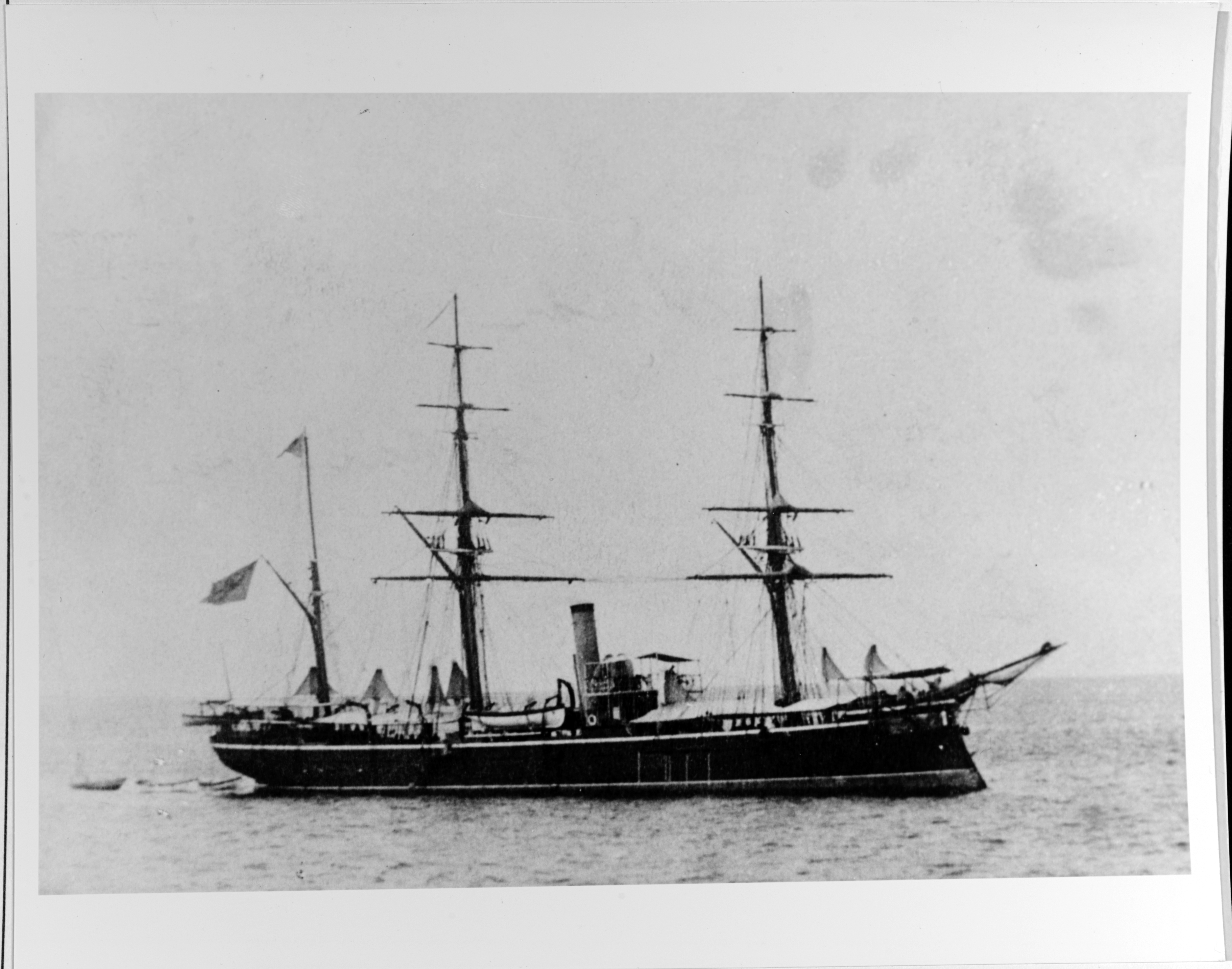 威遠號炮艦